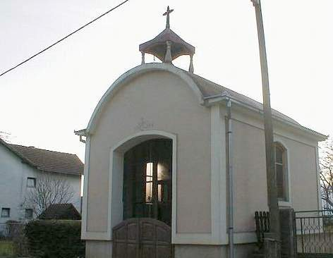 kapelica u Cerju